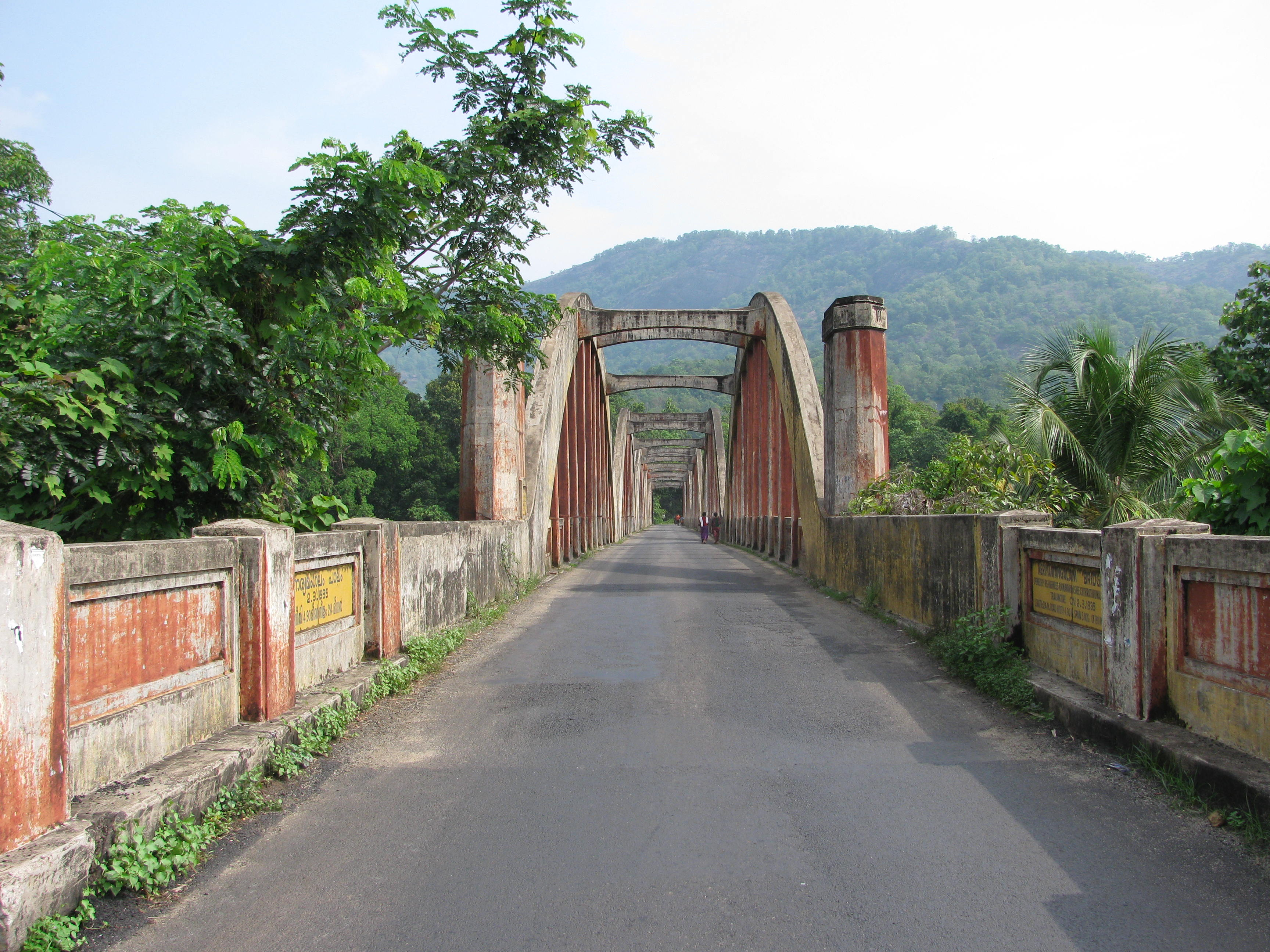 നേര്യമംഗലം പാലം